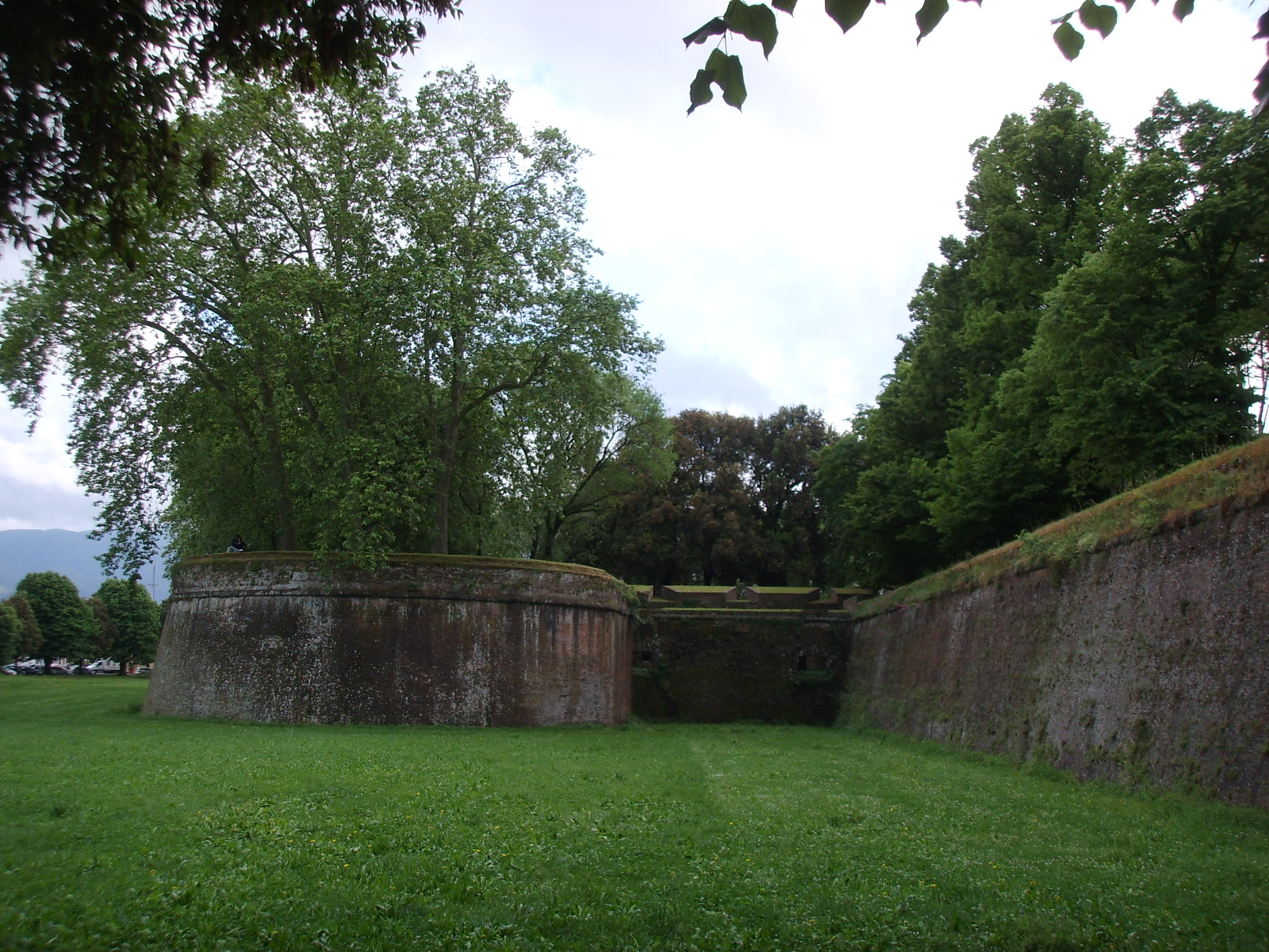 Mura di lucca presso porta elisa